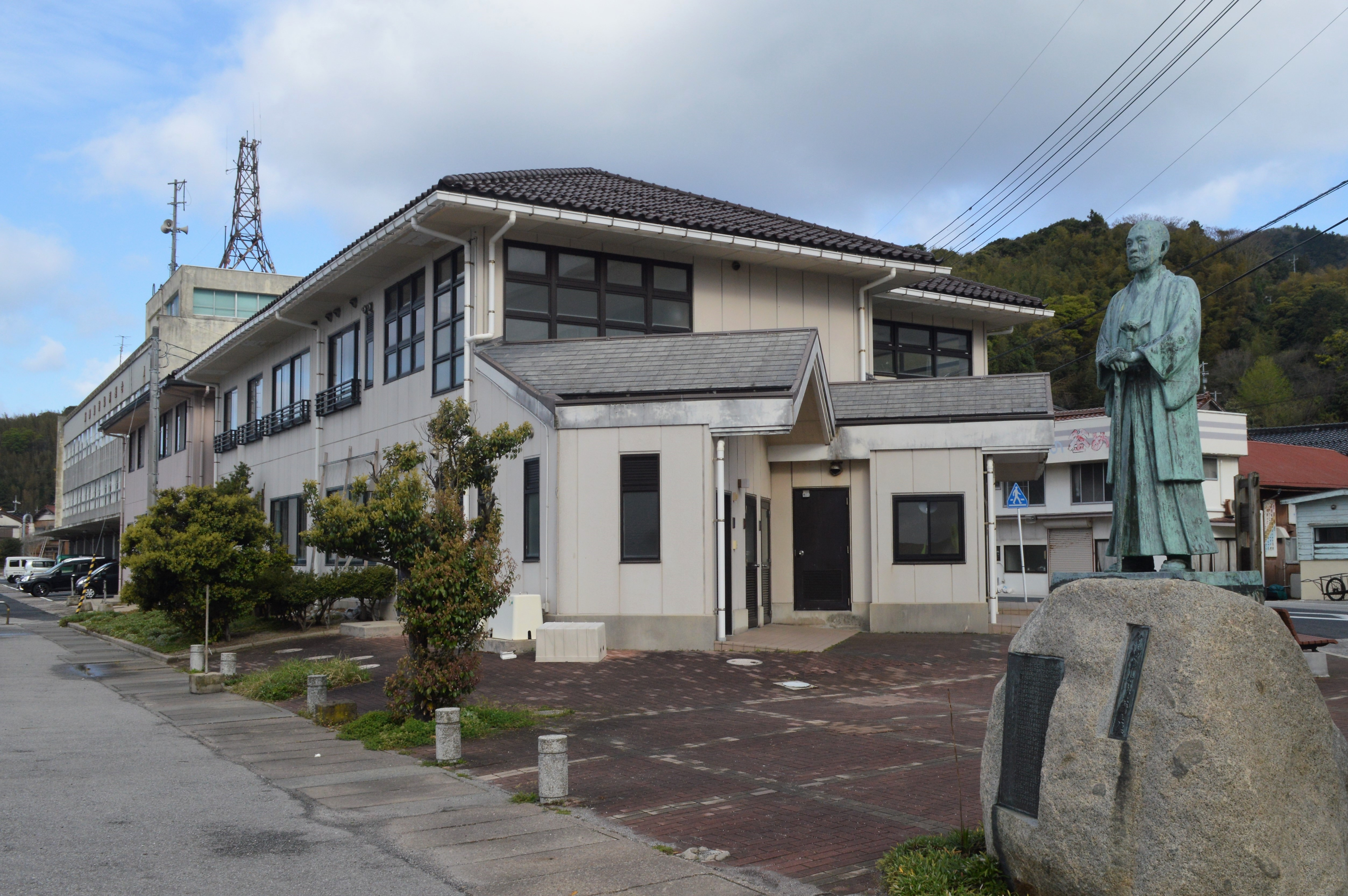 島根県隠岐郡西ノ島町浦郷。右は今崎半太郎像。中央は浦郷シルバー会館。左奥は浦郷漁業協同組合。